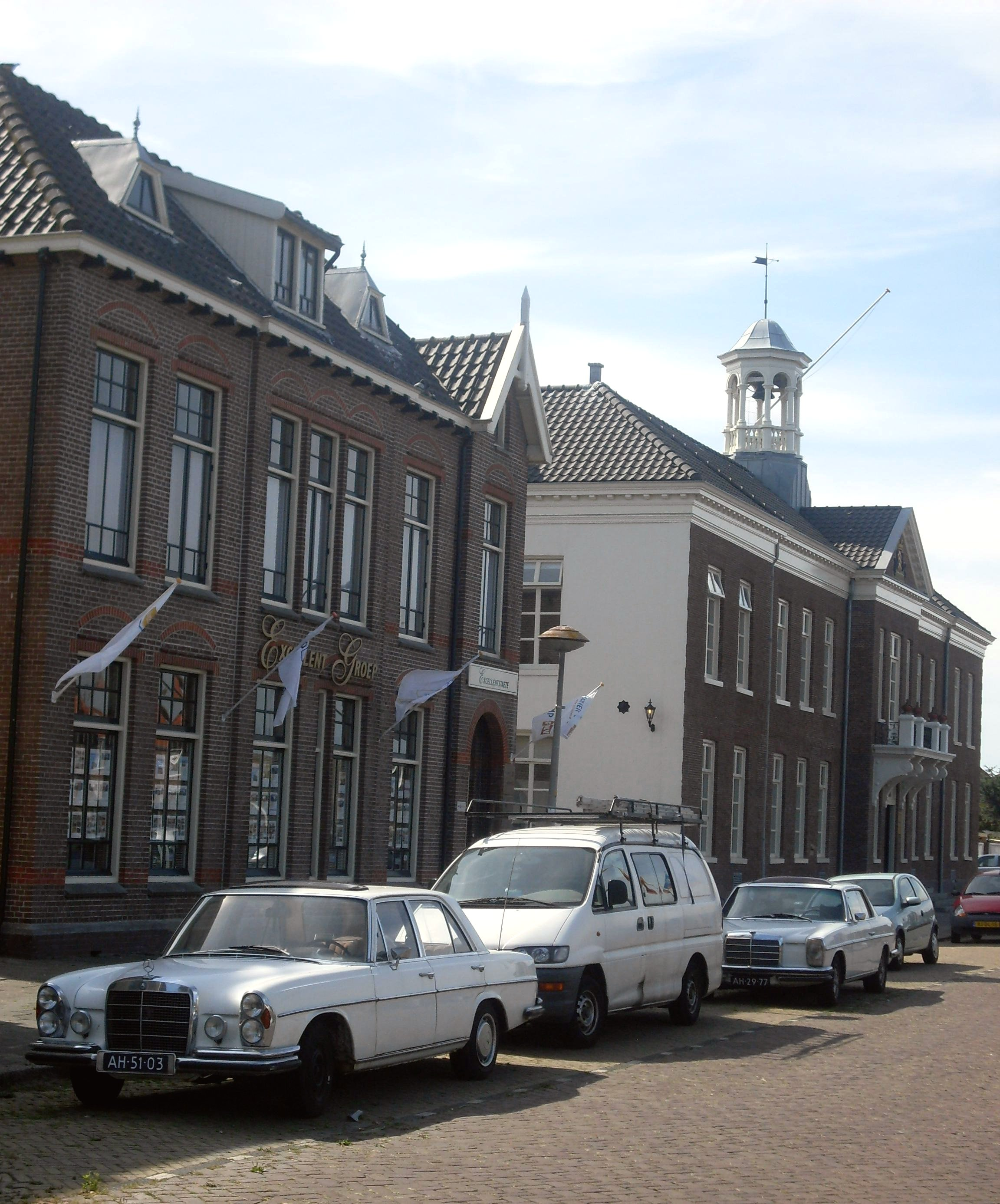 Het oude stadhuis van Den Helder